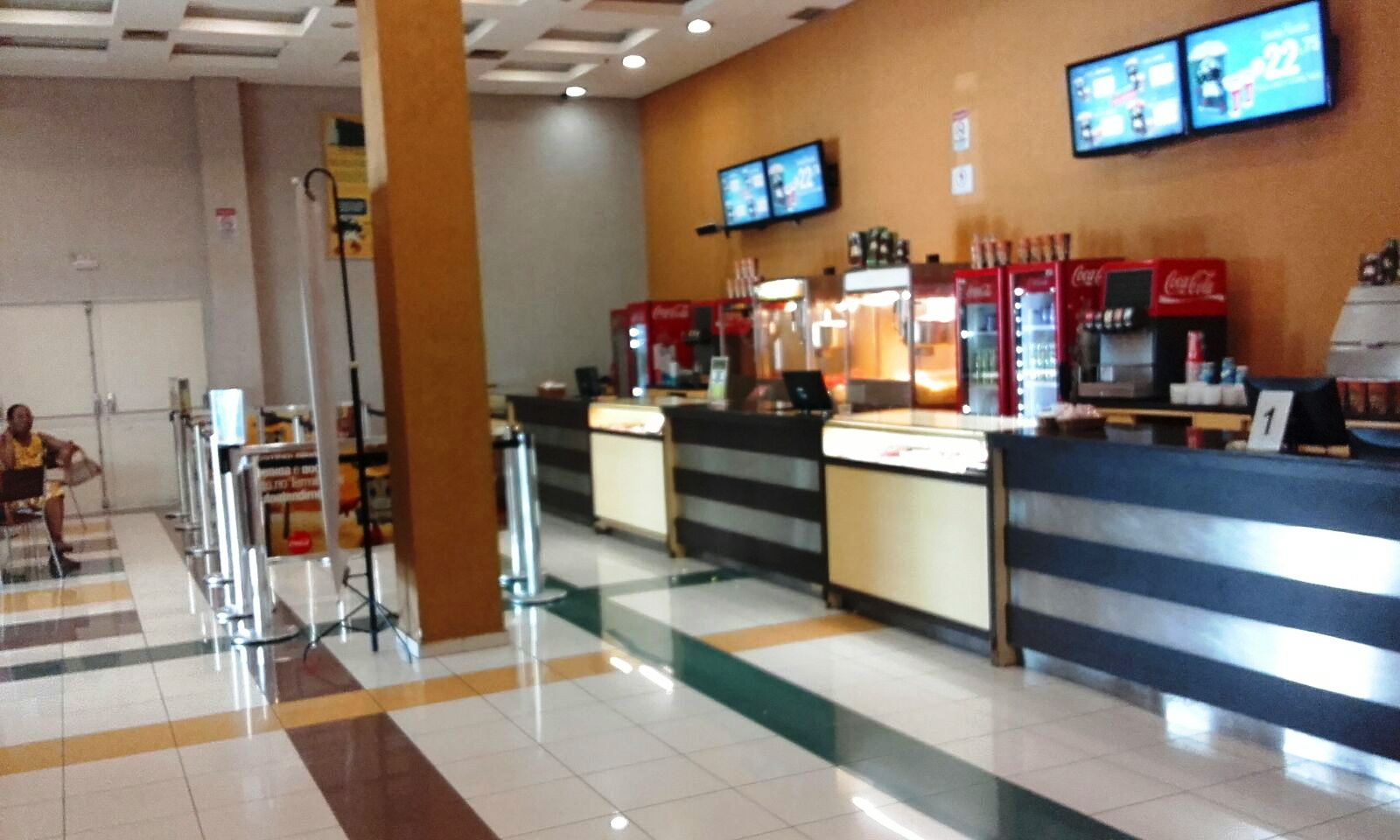 Bilheteria do Moviecom Boa Vista em janeiro de 2016